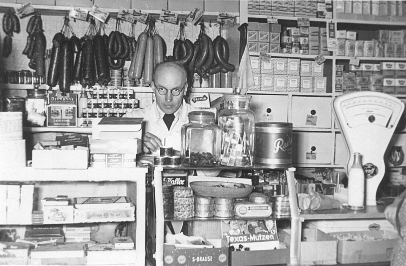 Klassischer Einzelhändler Ende der 1950er in Bochum-Werne, Boltestr. 19